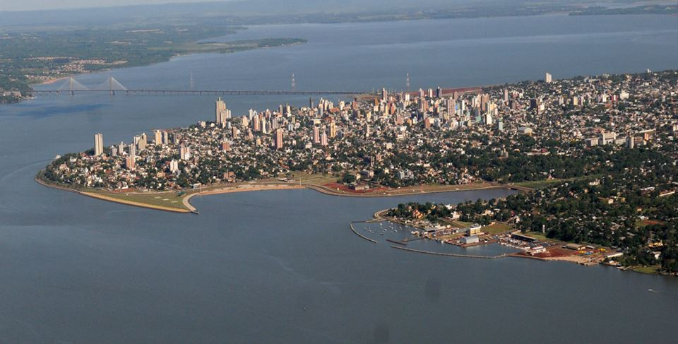 Skyline año 2014